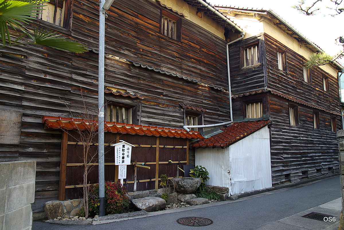 広島県東広島市の山陽鶴酒造の黒松の井戸。酒造の仕込み水。